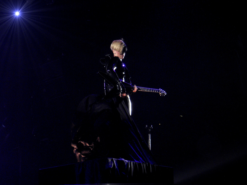 Concert de Rihanna P4160083